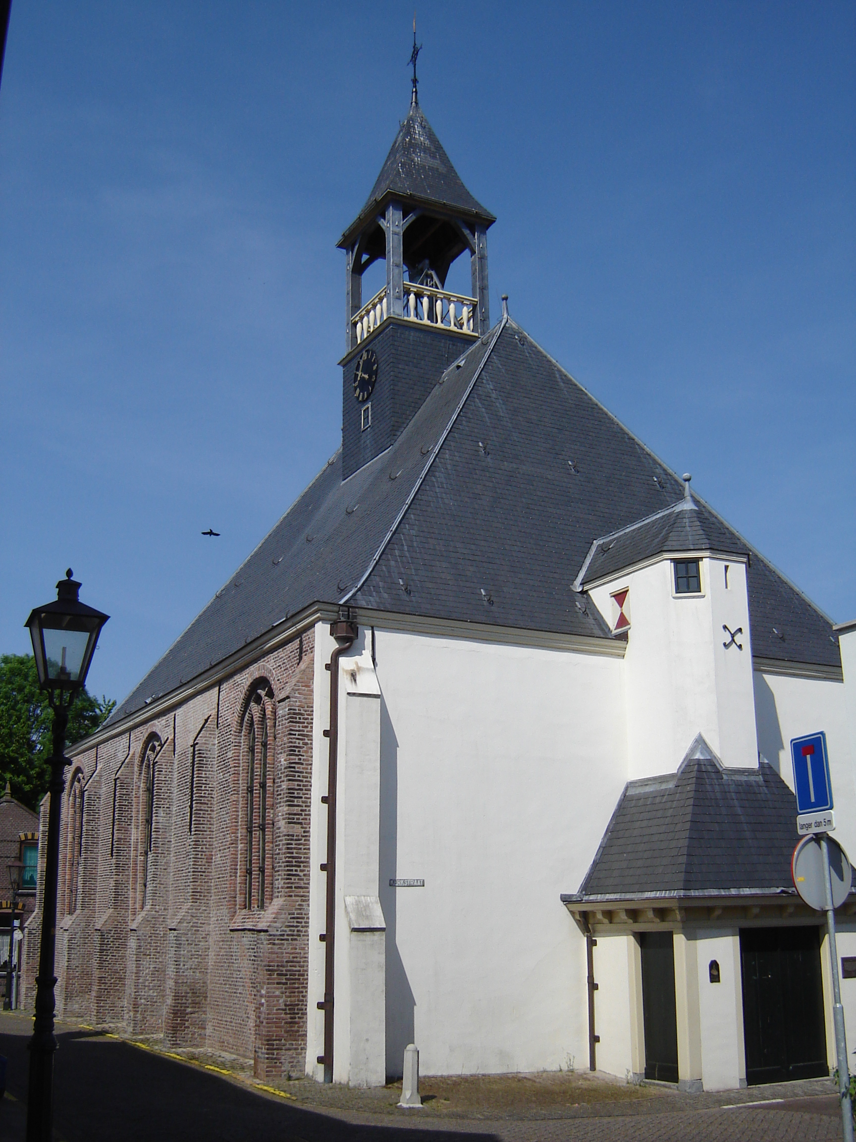 Nederlands Hervormde Kerk in Biervliet.Dutch Reformed Church in Biervliet. Biervliet, Terneuzen, Zeeland, Netherlands